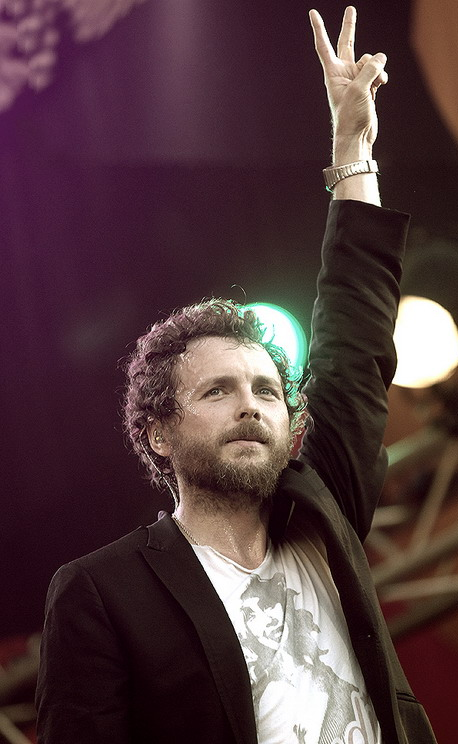 Lorenzo Jovanotti Cherubini live all' Mtv Day 2007 - Milano